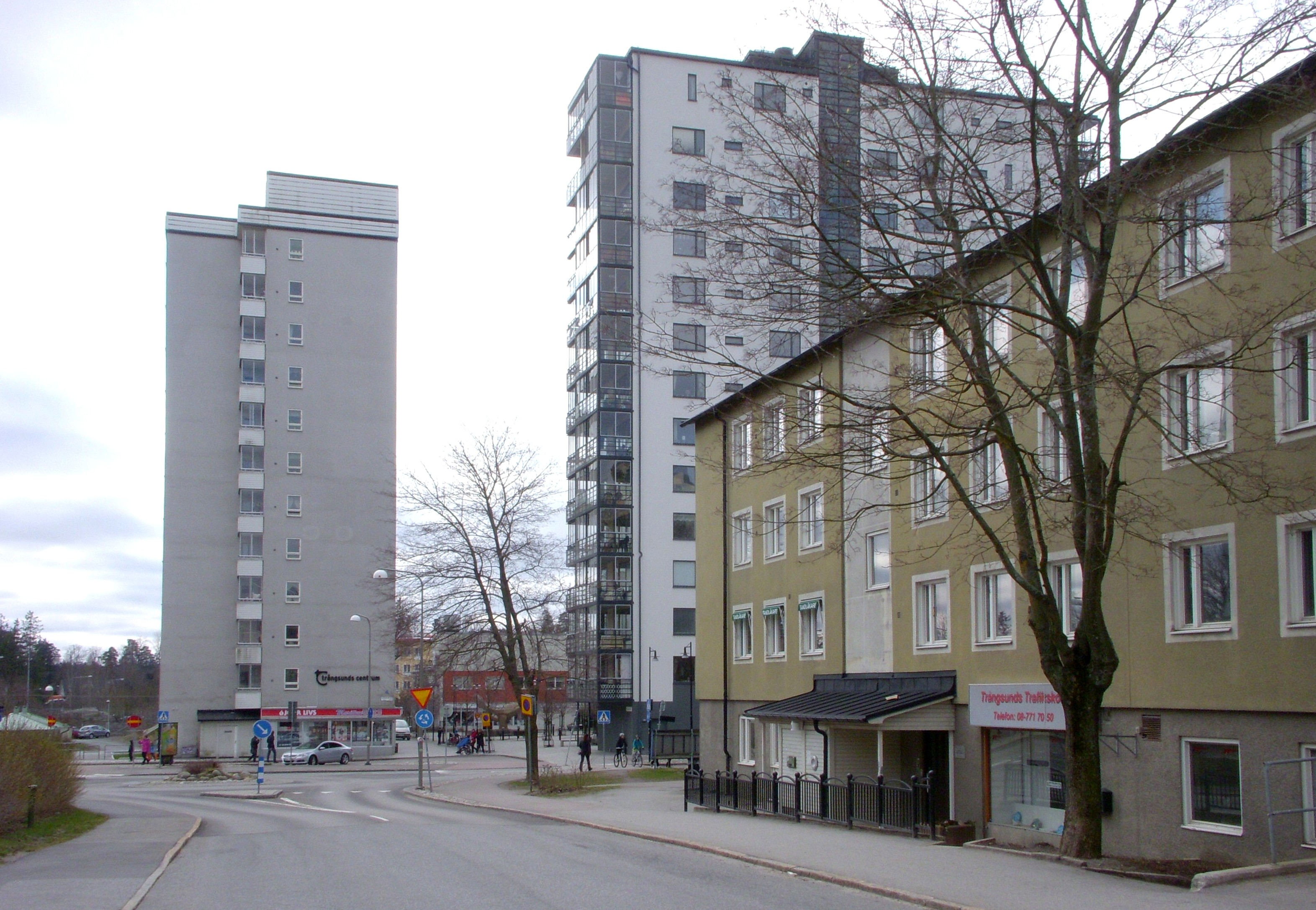 Trångsund: Bebyggelse vid Hammartorpsvägen söderut